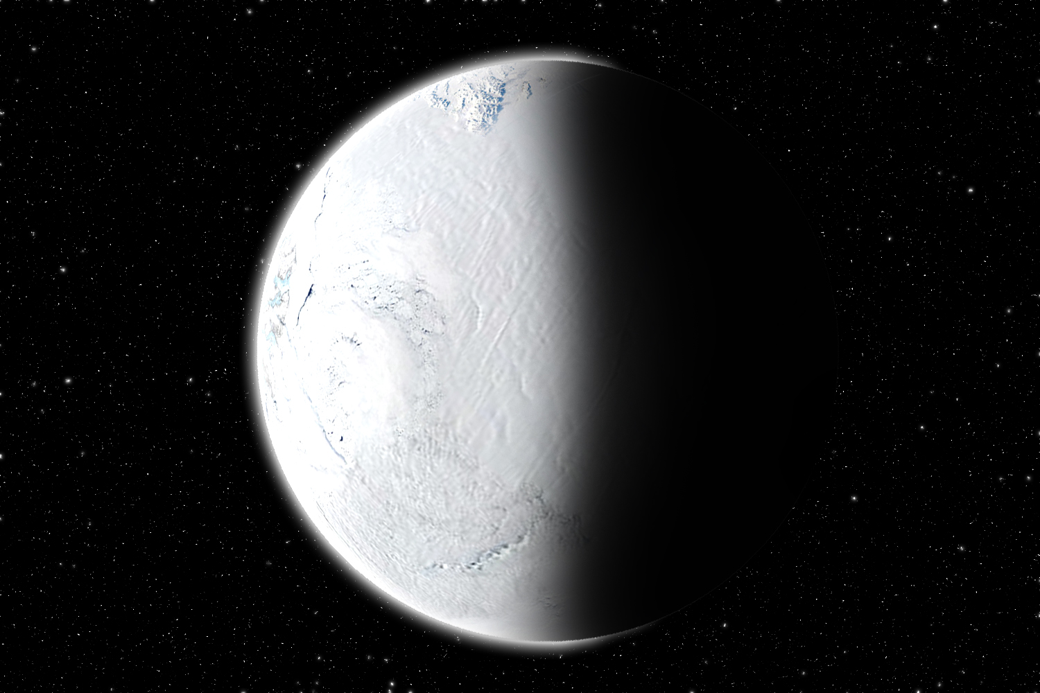 Planeta helado